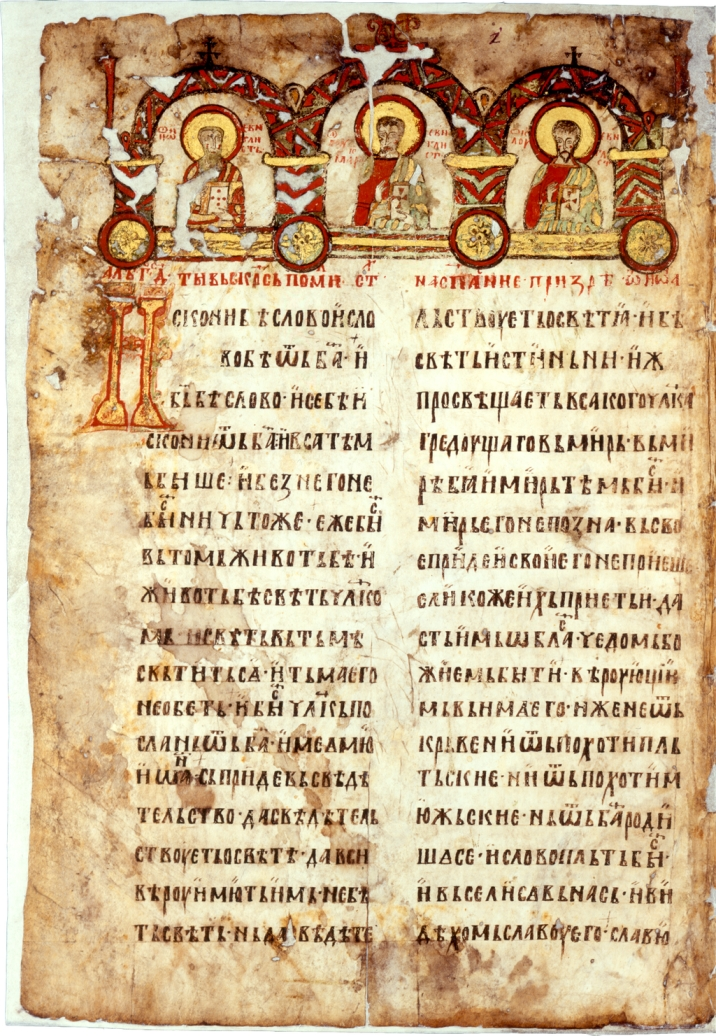 Miroslav's Gospel p. 1